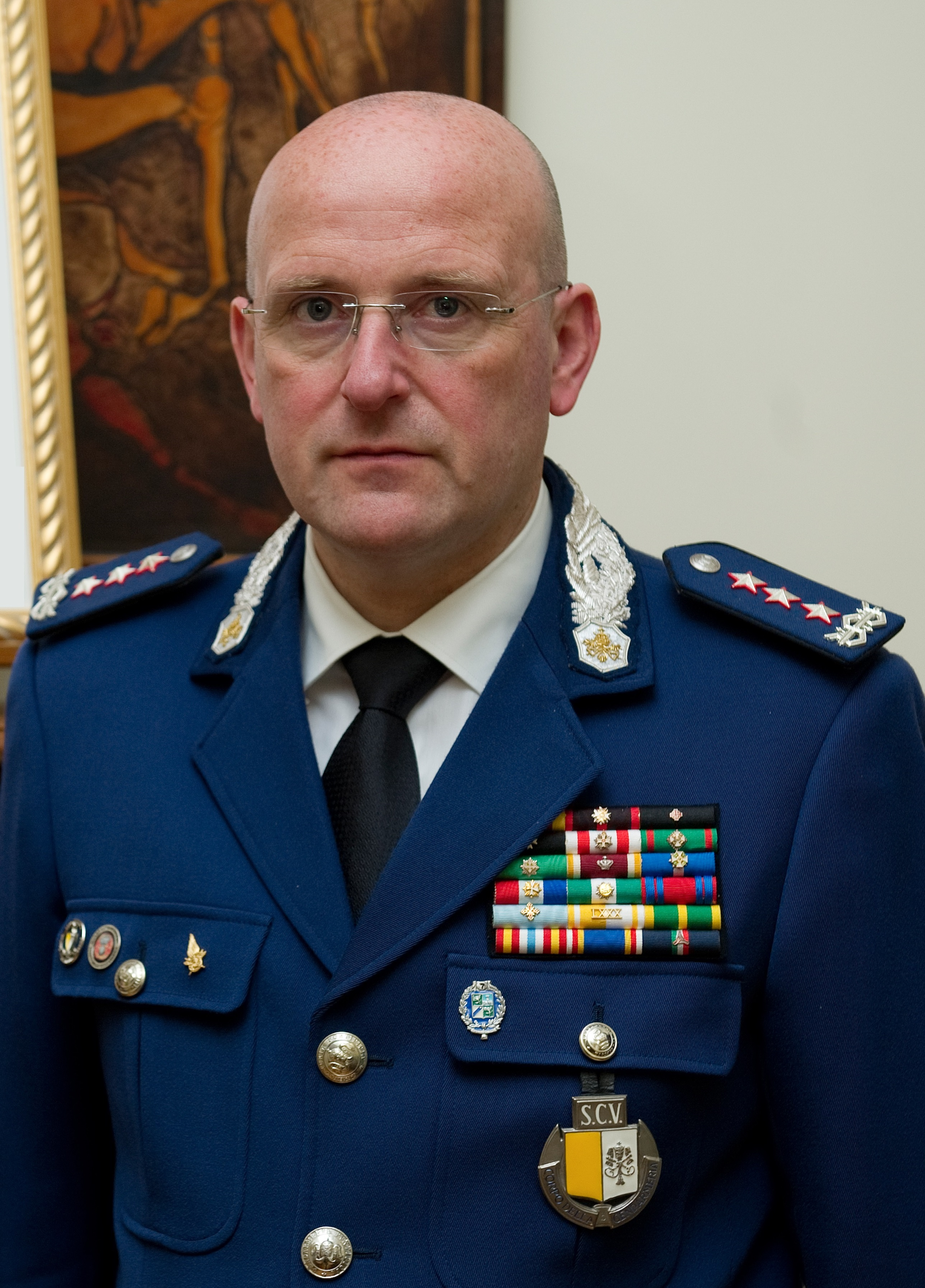 Il Direttore Domenico Giani